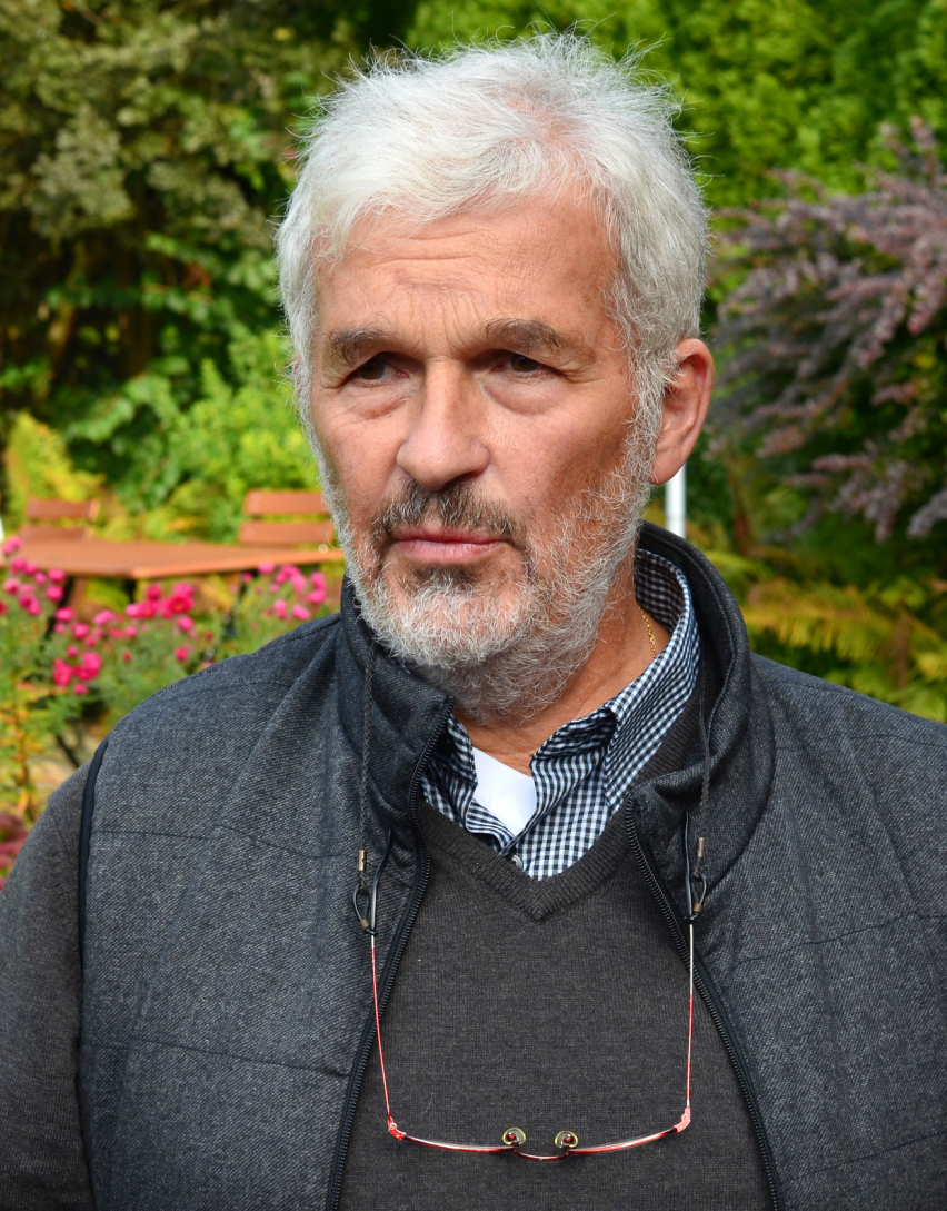 Bei der wissenschaftlichen Tagung zu den Harzhöhlen und ihr Kulturerbe am 14. Oktober 2016 in Scharzfeld